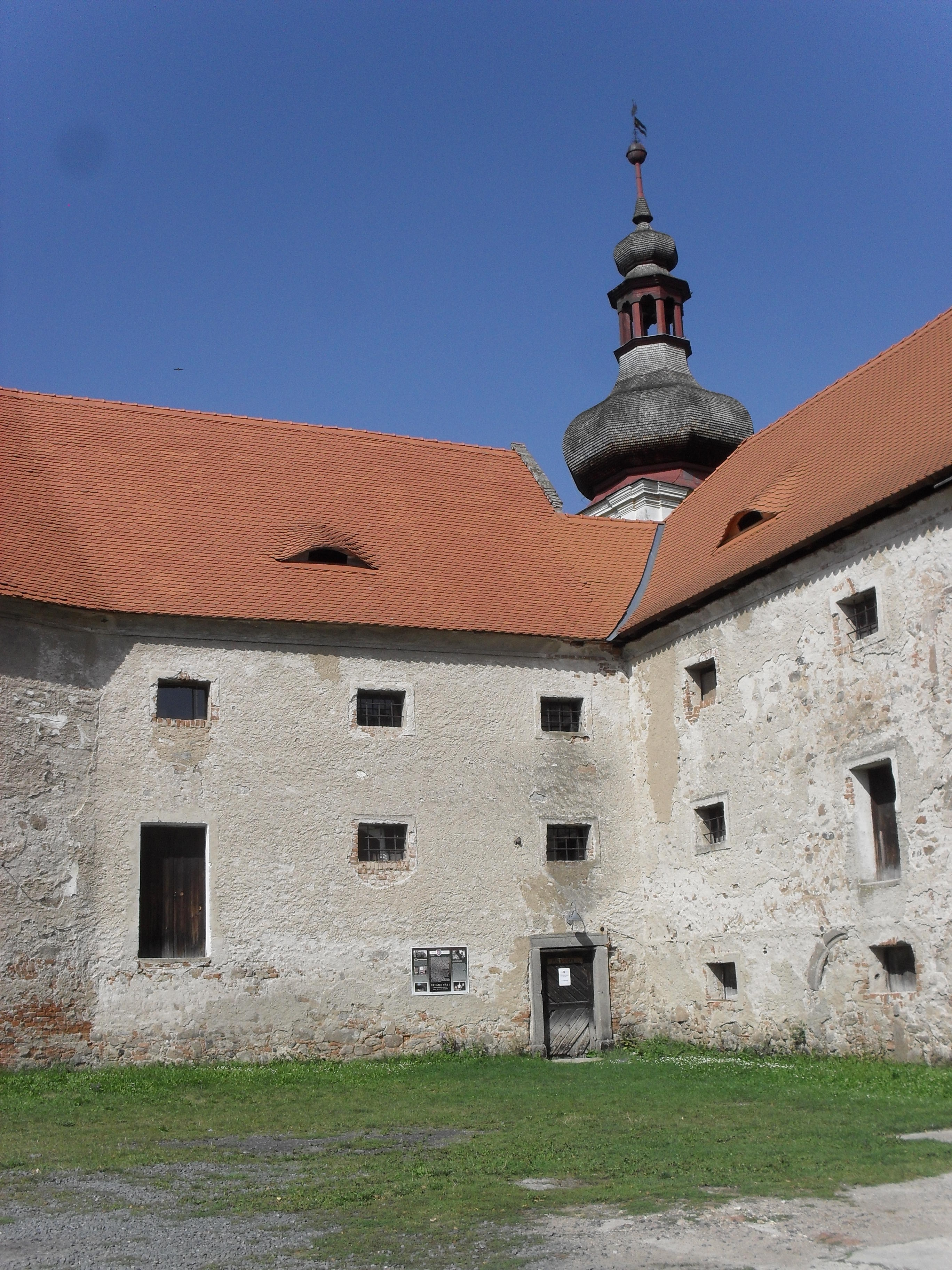 Fotografie pořízena v obci Kadov u Strakonic.